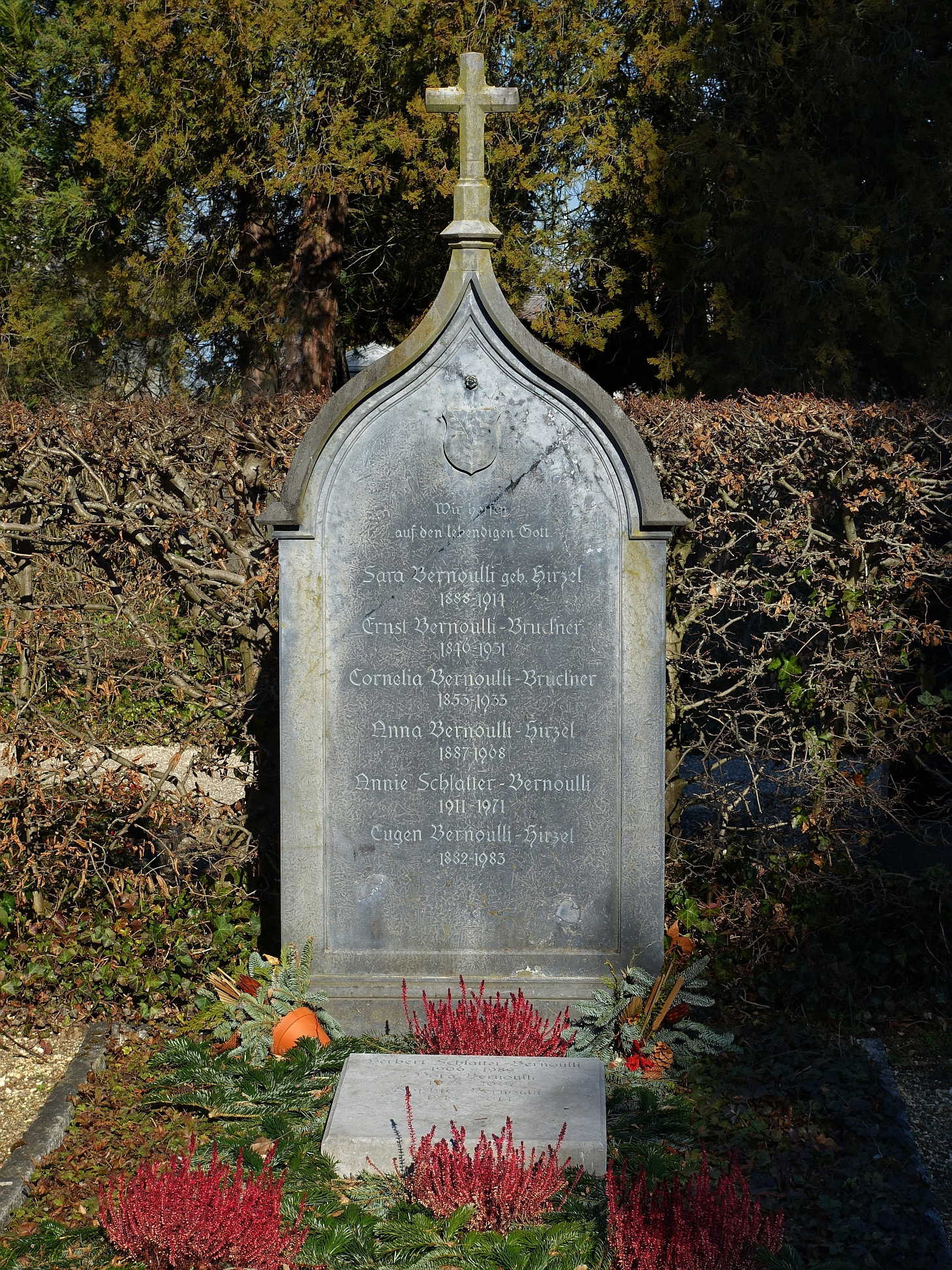 Eugen Bernoulli-Hirzel (1882–1983) Dr. med., Prof. Pharmakologie, Familiengrab Bernoulli-Hirzel-Bruckner-Schlatter auf dem Friedhof Wolfgottesacker, Basel.